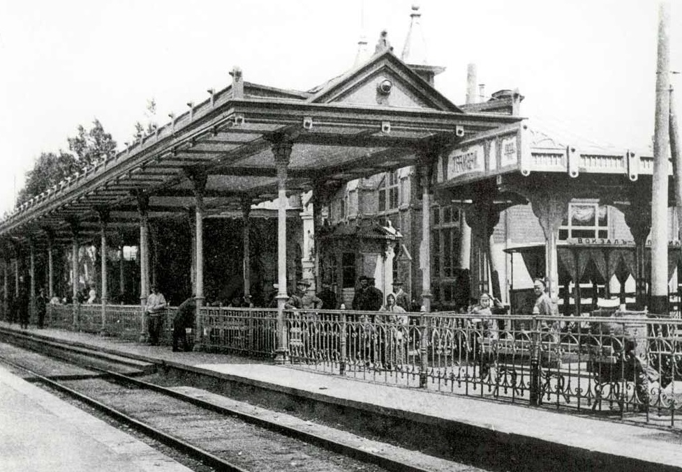 Вокзал и остановка травмая в Пятигорске